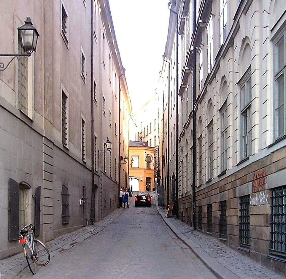 Tullgränd, Gamla stan, Stockholm.